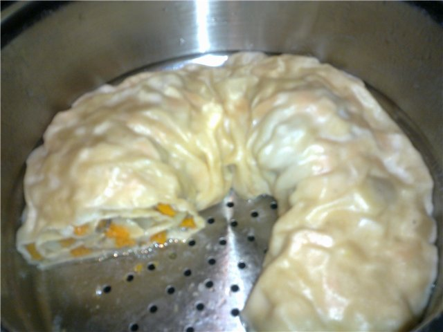 Кыргызча: оромо001